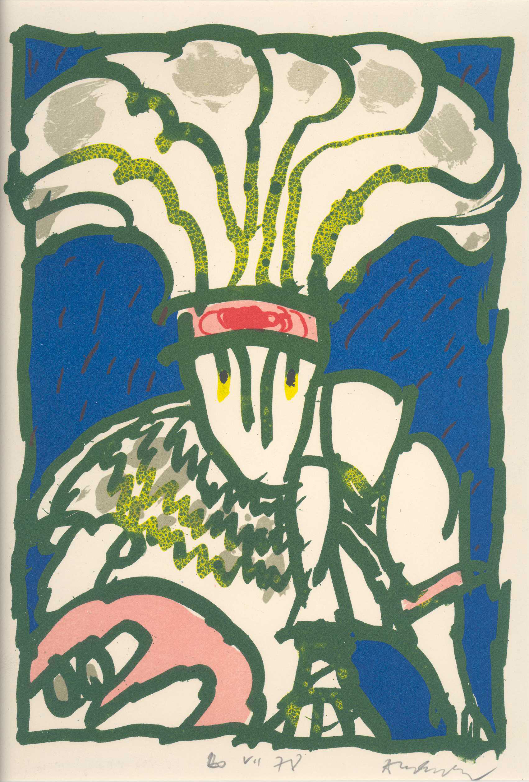 Kleuren litho. Nr. 1/150. 1978. Hoort bij vrm 00571. Collectie Gelderland.